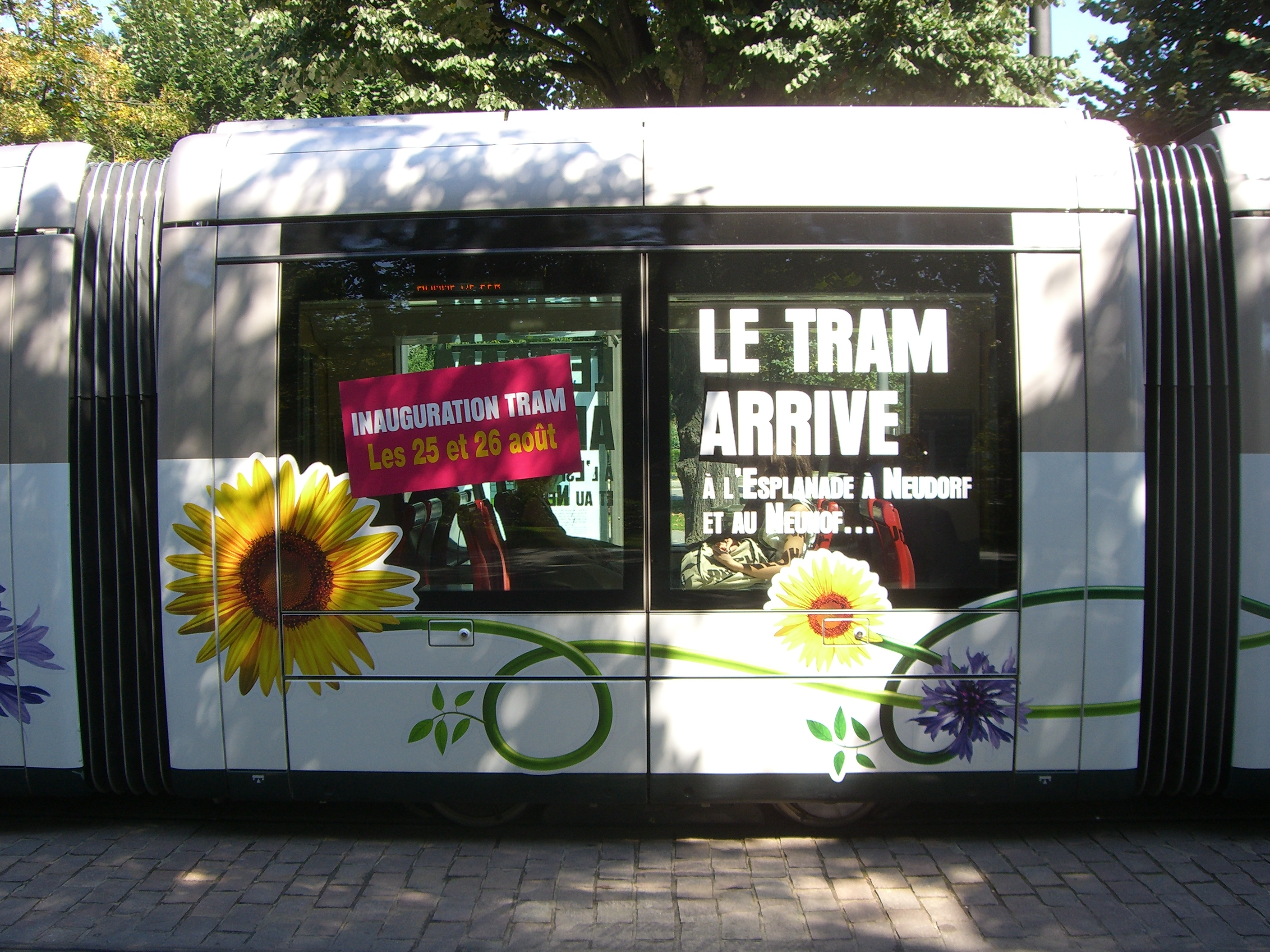 Strasbourg - Straßenbahn - Eigenwerbung.jpg